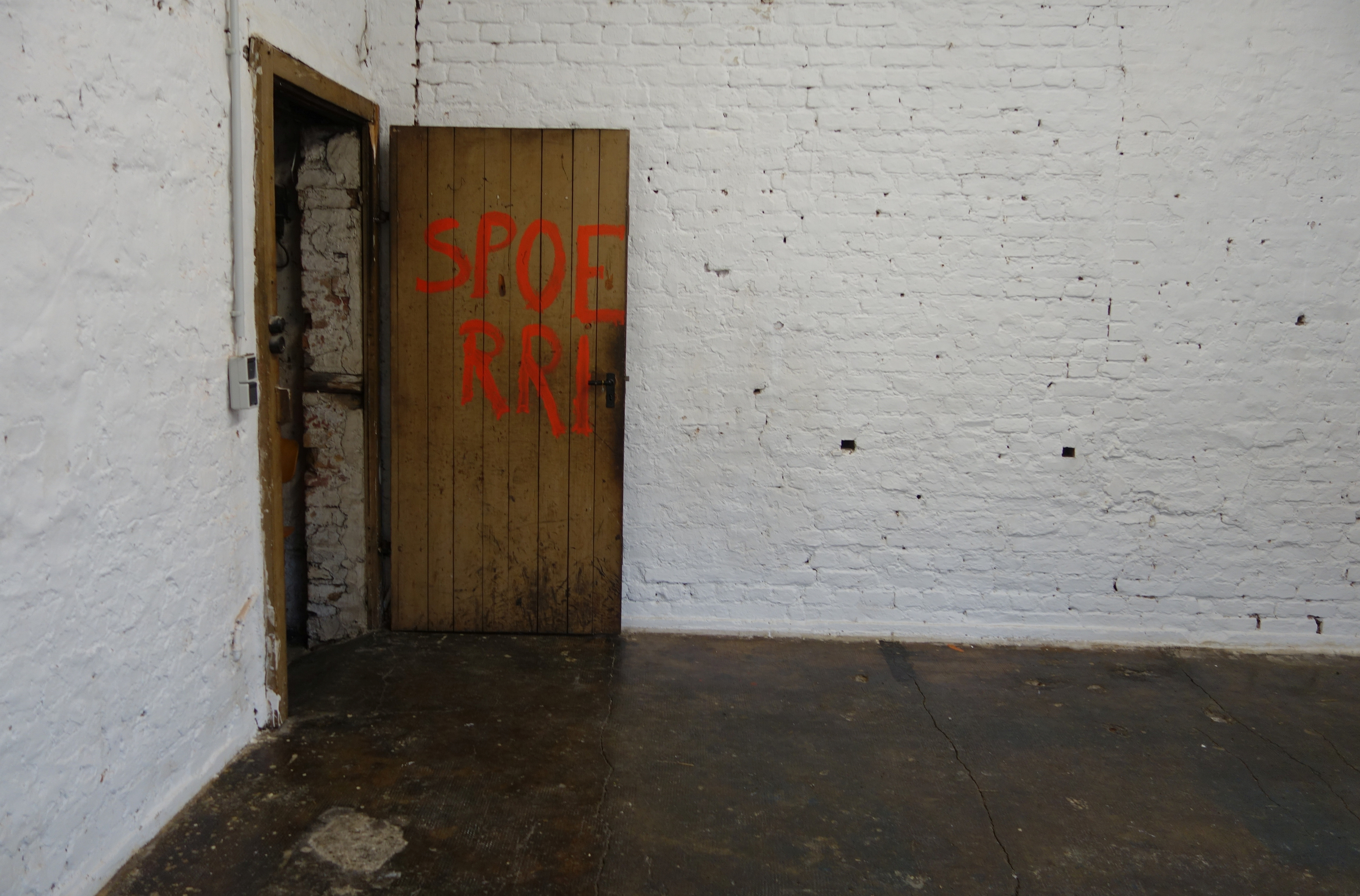 „Kunstraum“ im ehemaligen Atelier des Daniel Spoerri, 2017 . Düsseldorf, Ackerstraße 24, Hinterhof.